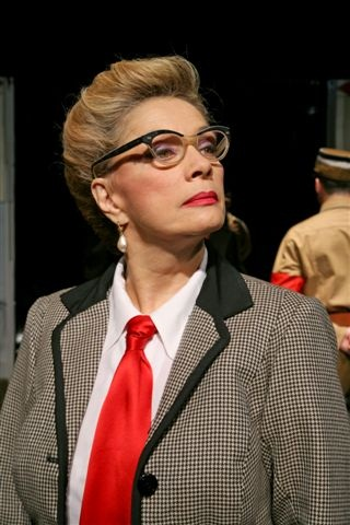 מוניקה ורדימון בהצגה ההצגה ווער יז ווער, תיאטרון יידישפיל